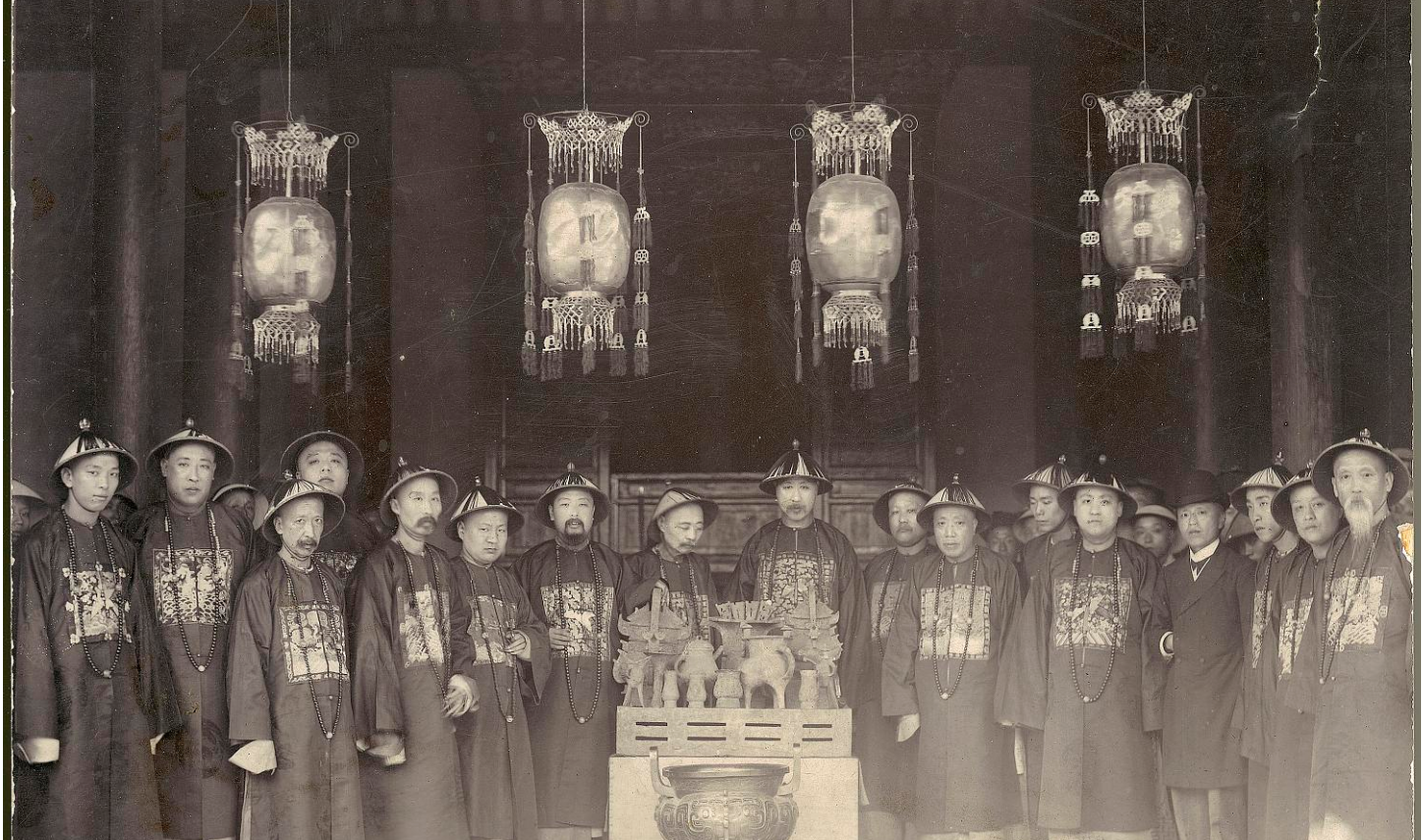 Дуаньфан (1861 - 1911) - наместник Цзянсу, в своём домашнем музее со свитой